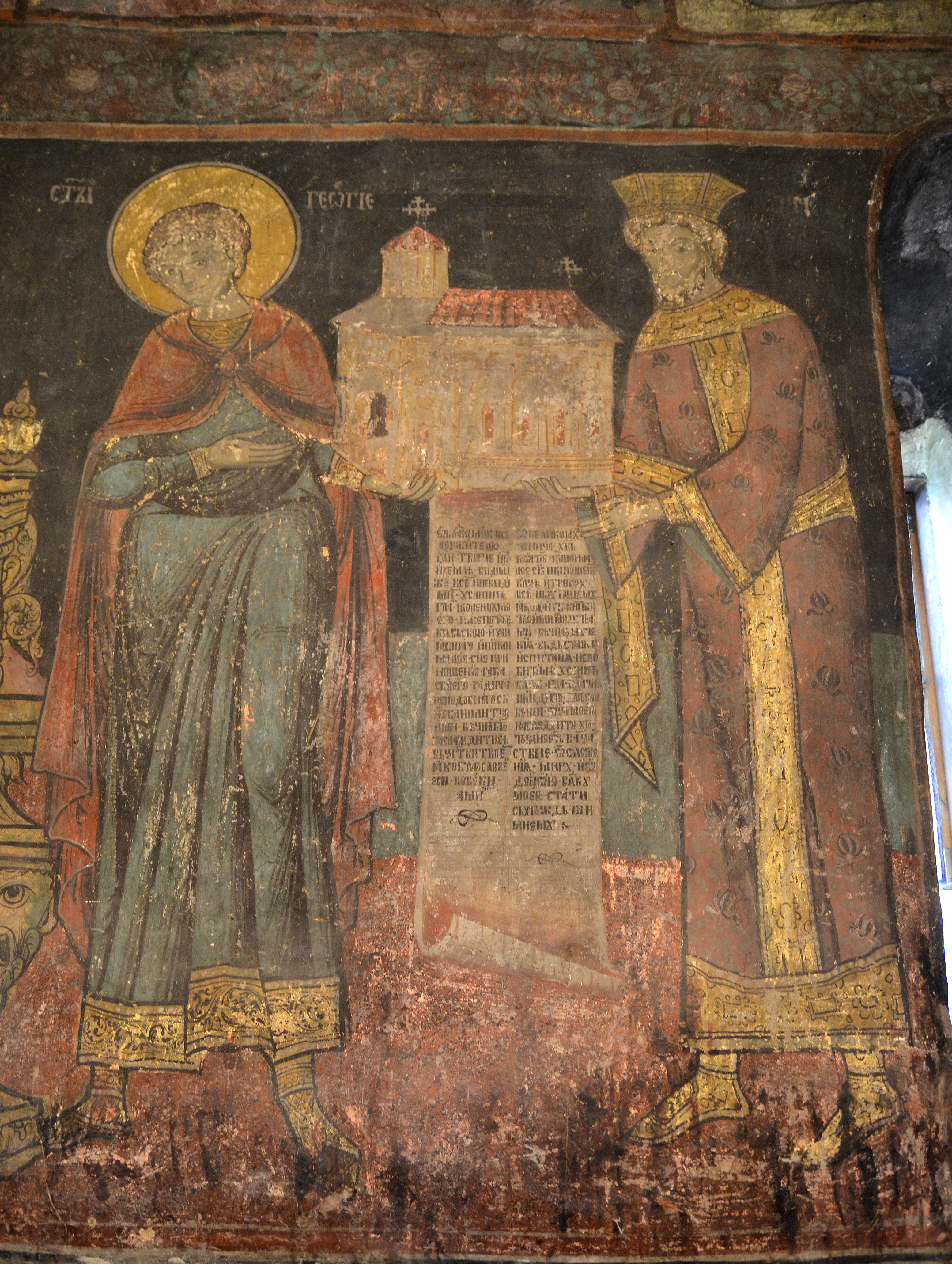 Фреска са ктитором и ктиторском повељом, манастир Враћевшница, Србија.